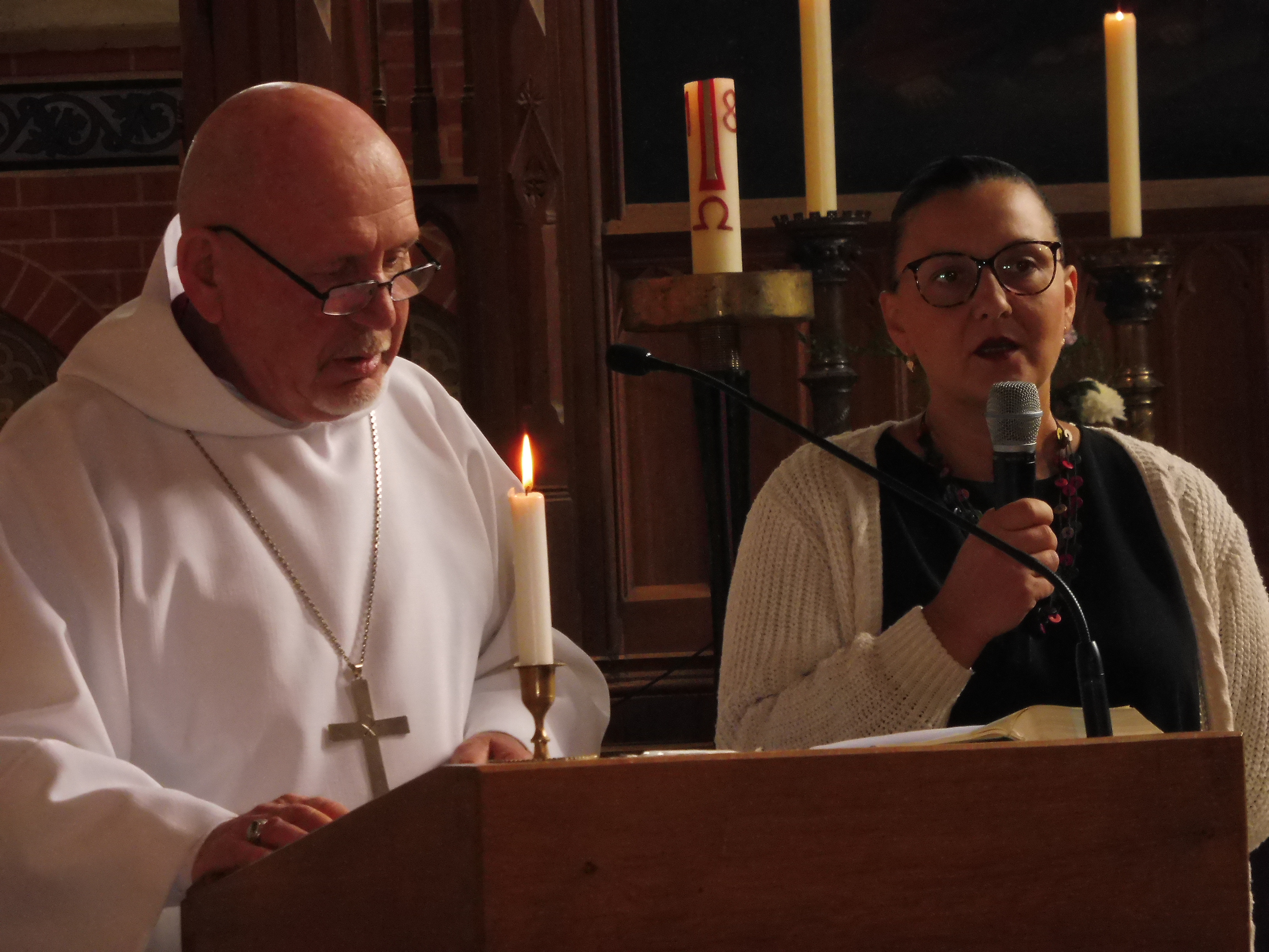 Kasachstans Erzbischof Jurij Novgorodov und Nadia Helberg als Dolmetscherin in der Plauer Marienkirche